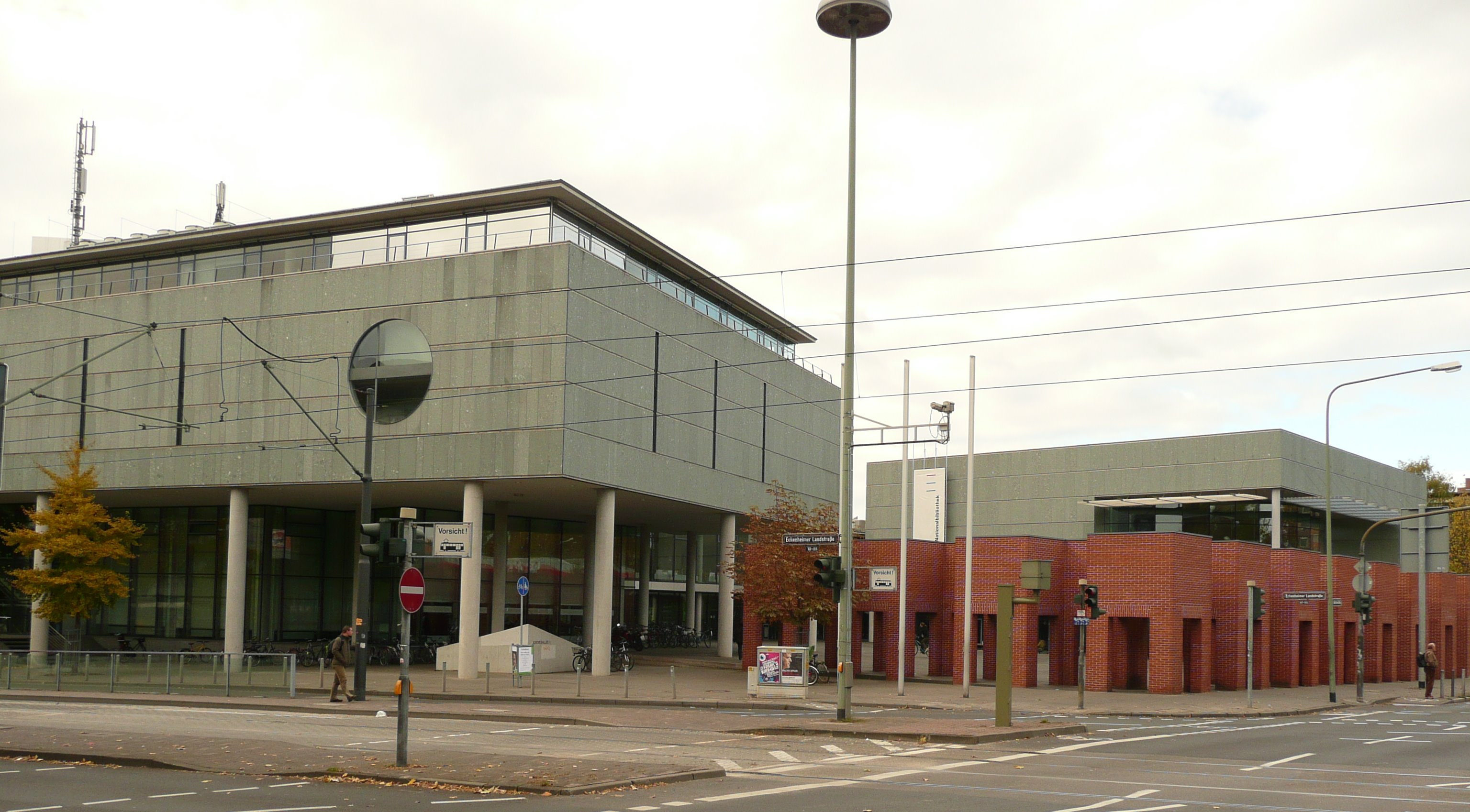 Deutsche Bibliothek in Frankfurt am Main